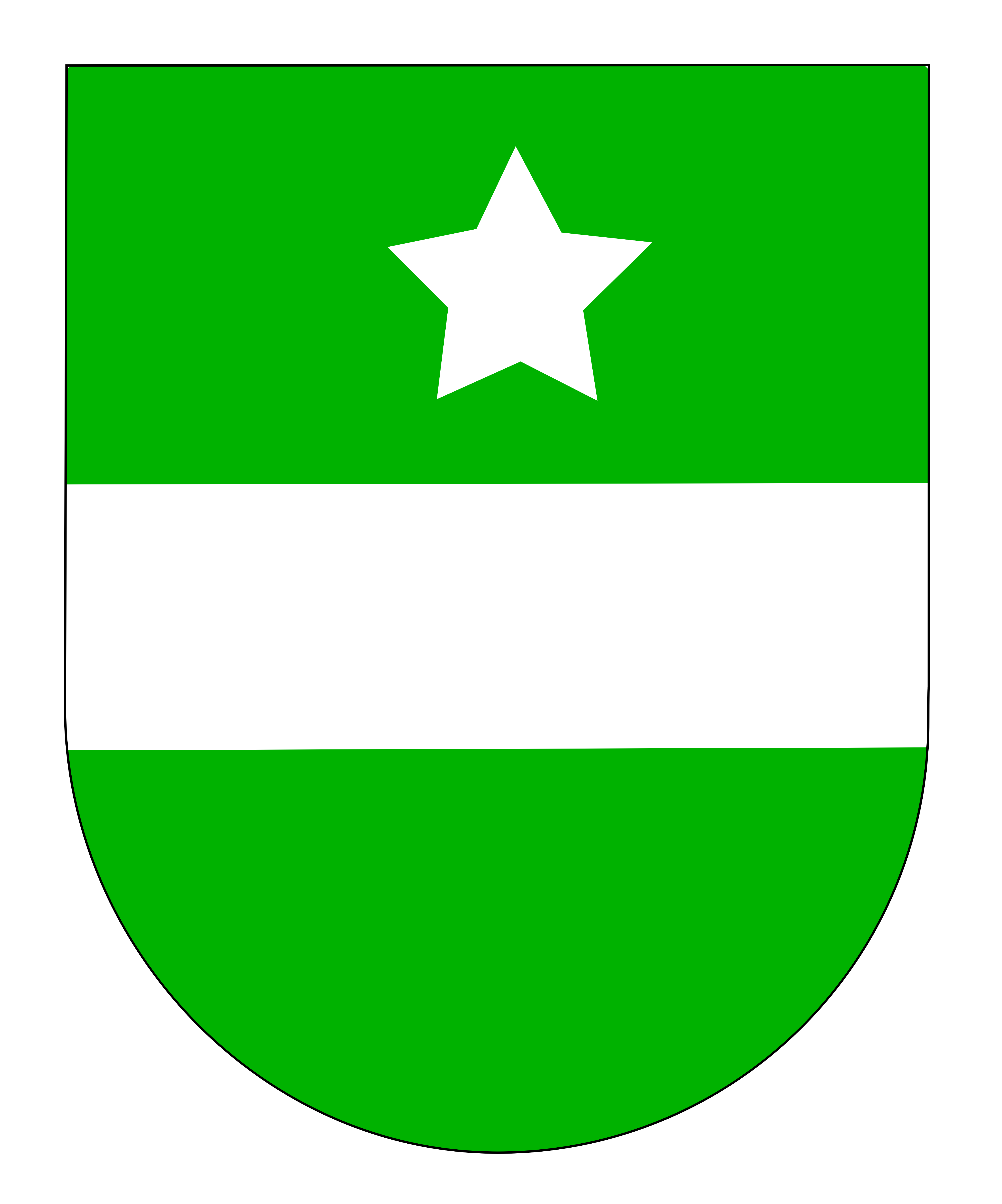 Hyssnas sockenvapen tolkat efter dess blasonering.